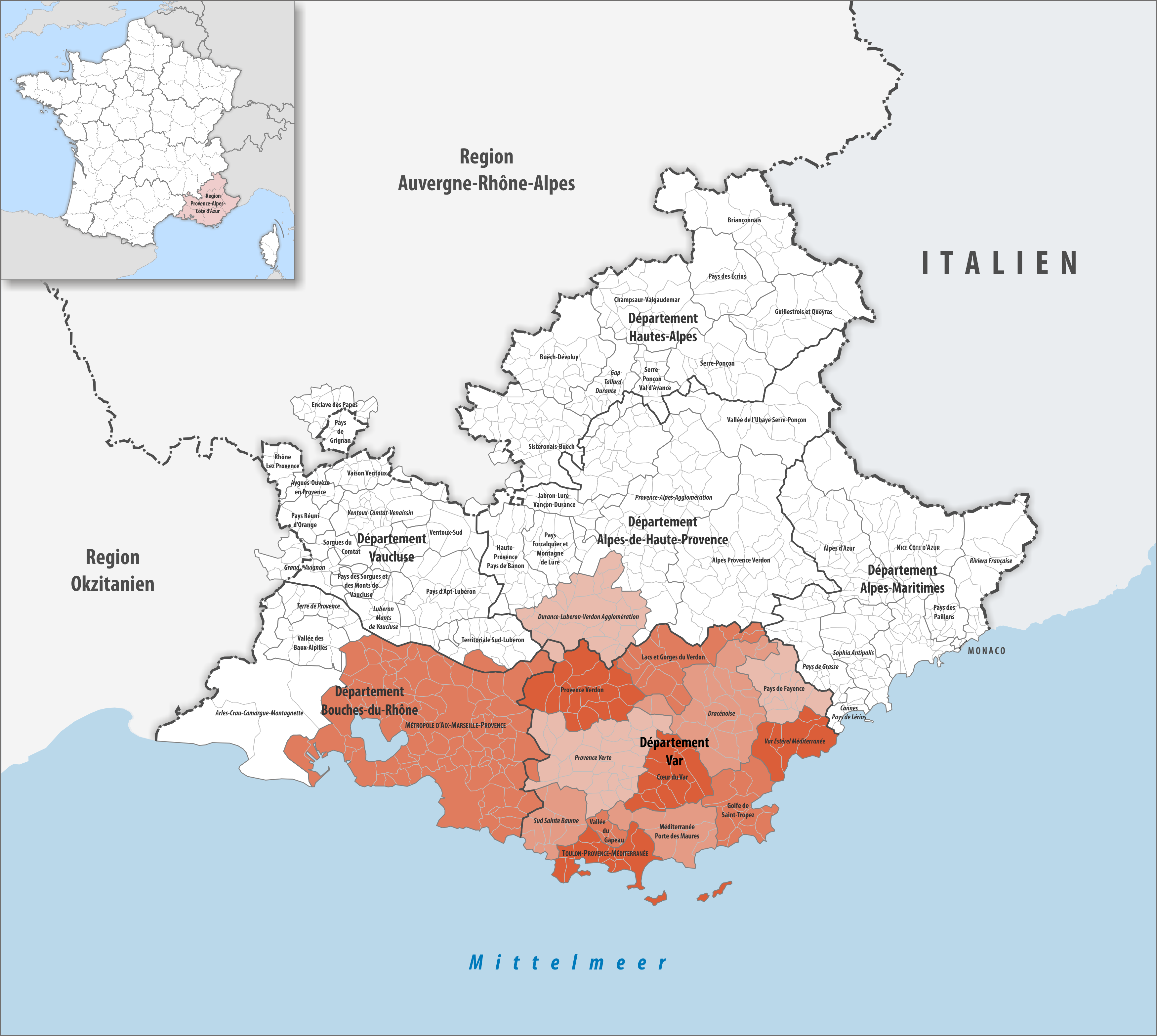 Gemeindeverbände im Département Var